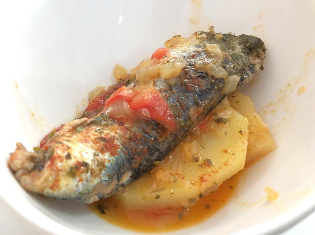 Guiso de xoubas.